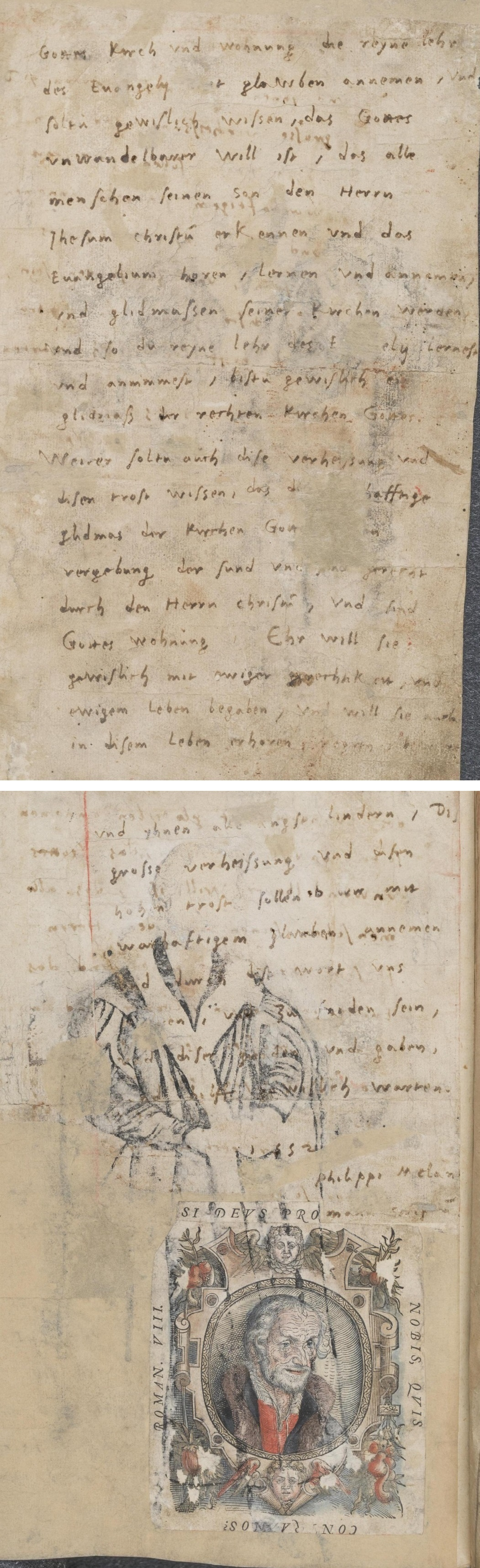 Autograph von Philipp Melanchthon (Fragment), eingeklebt in die Dresdner Reformatorenbibel Transkriptionsversuch von Rabanus Flavus: Gotts Kirch vnd wohnung die reyne lehr des Euangelii mit glauben annemen, vnd soltu gewislich wissen, das Gottes vnwandelbarer will ist, das alle menschen seinen Son den Herrn Jhesum Christum erkennen vnd das Euangelium horen, lernen vnd annemen, vnd glidmassen seiner kirchen werden. Vnd so du reyne lehr des euangelii lernest vnd annimmest, bistu gewislich ein glidmaß der rechten Kirchen Gottes. Weiter soltu auch dise verheissung vnd disen trost wissen, das die warhafftige glidmas der Kirchen Gottes haben vergebung der sund vnd sind gerecht durch den Herrn christum, vnd sind Gottes wohnung. Ehr will sie gewislich mit ewiger gerechtigkeit vnd ewigem leben begaben, vnd will sie auch in disem Leben erhoren, vnd yhnen alle angst lindern, Dis grosse verheissung vnd disen hohen trost sollen wir mit warhaftigem glauben annemen vnd durch dise wort vns trosten, vnd zu friden sein vnd diser gnaden vnd gaben vnd hilfe gewislich warten. Philippi Melan manu scriptum